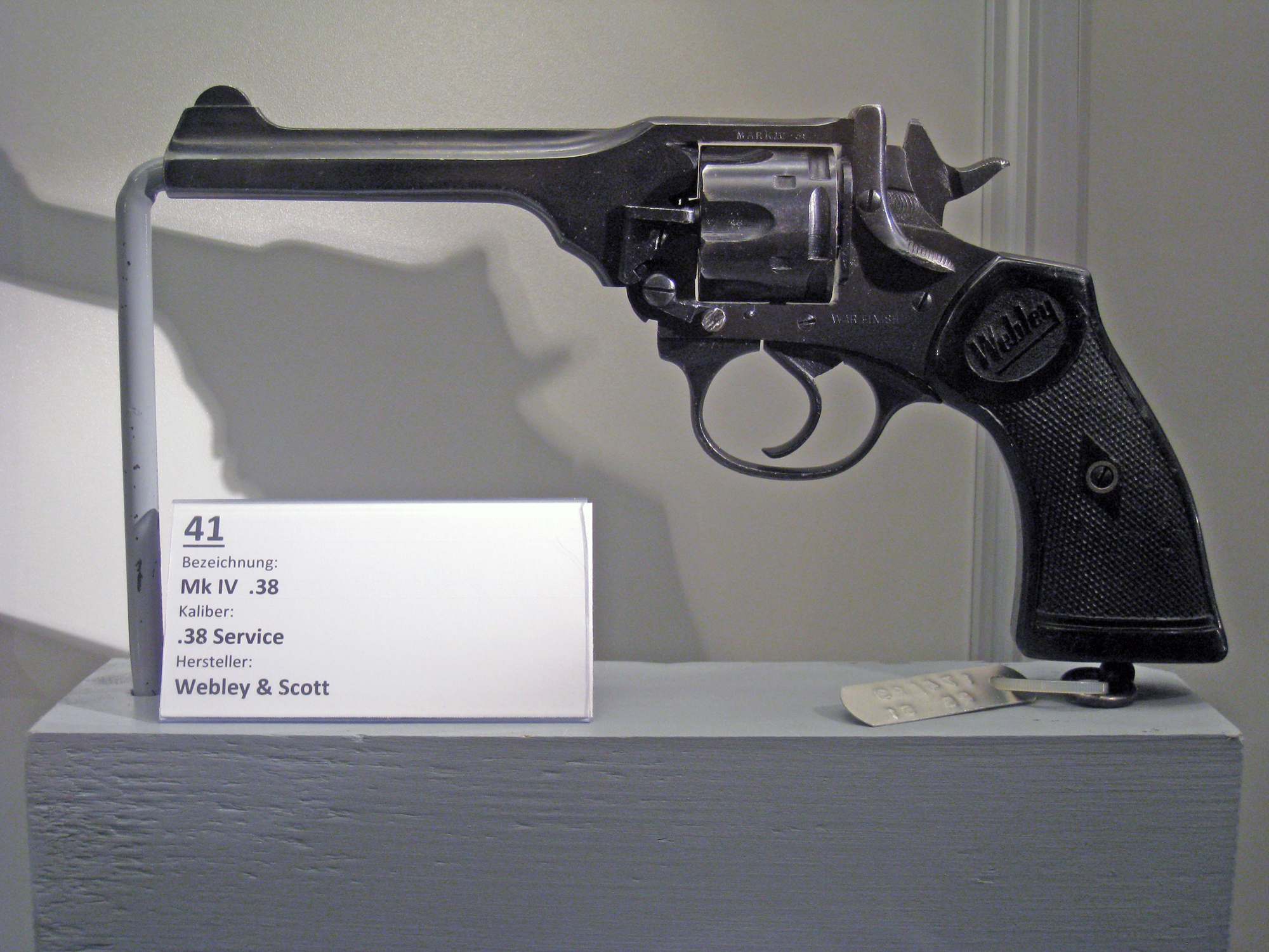 Festungsmuseum Reuenthal, Sonderausstellung Walter H. Zuleger 2015/16, britischer Revolver Webley & Scott, Mark IV, Kaliber .38